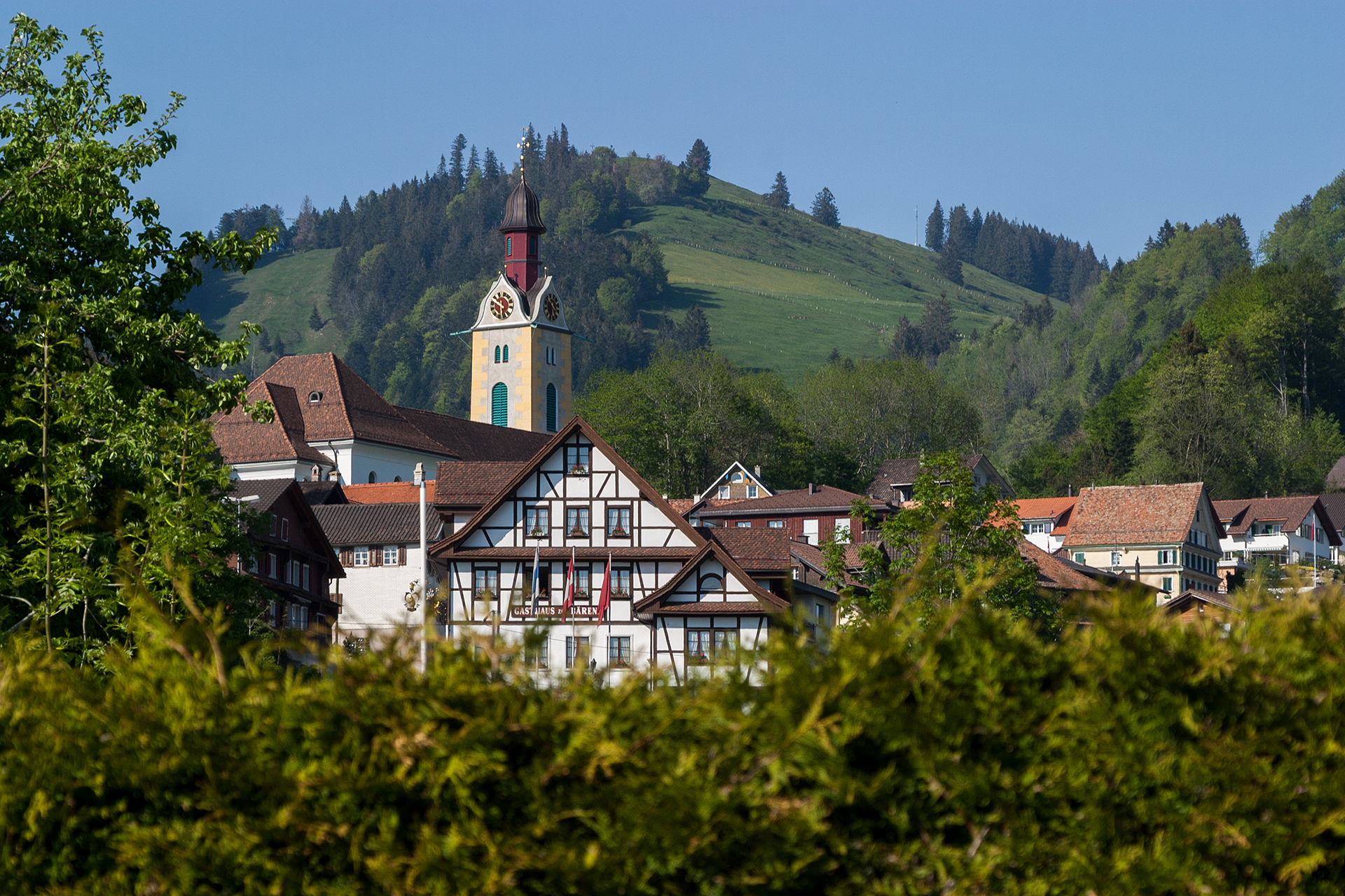 Sattel (SZ)